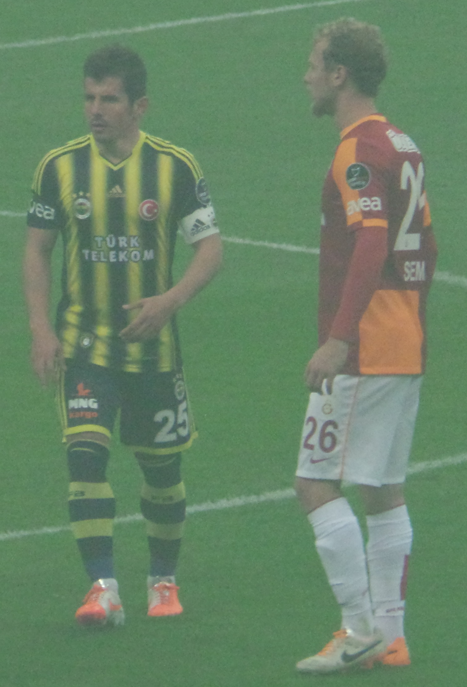 Galatasaray altyapısından yetişen Semih Kaya ve Emre Belözoğlu